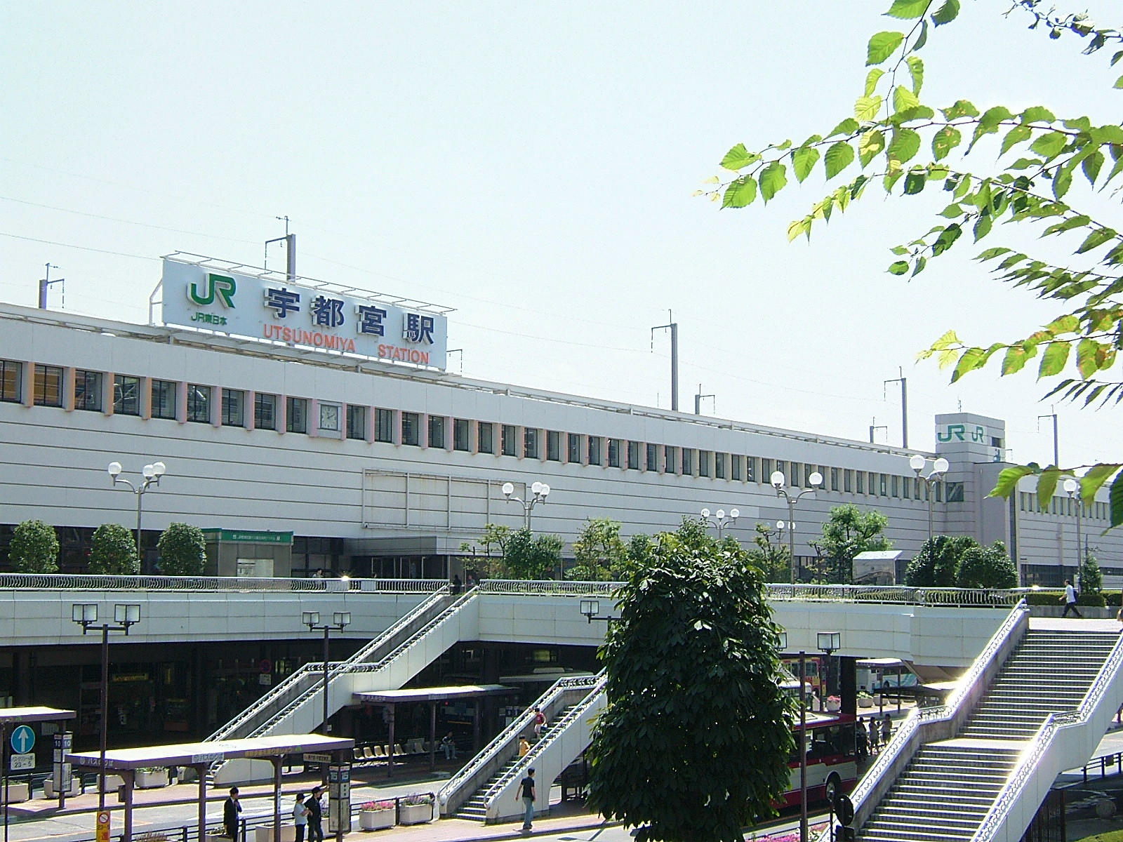 JR Utsunomiya Station